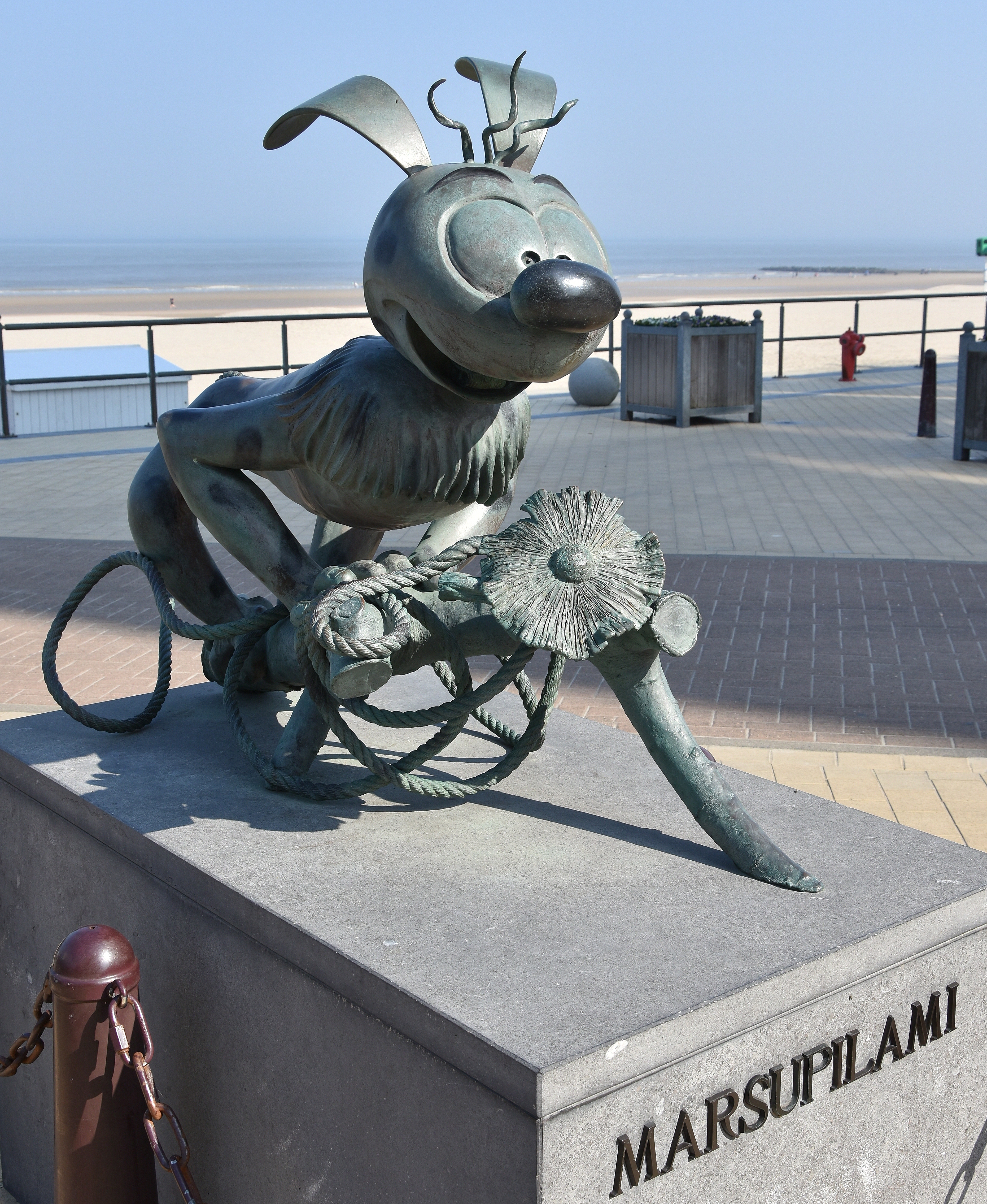 Jan Maillard - Nero - Stripstandbeelden Middelkerke